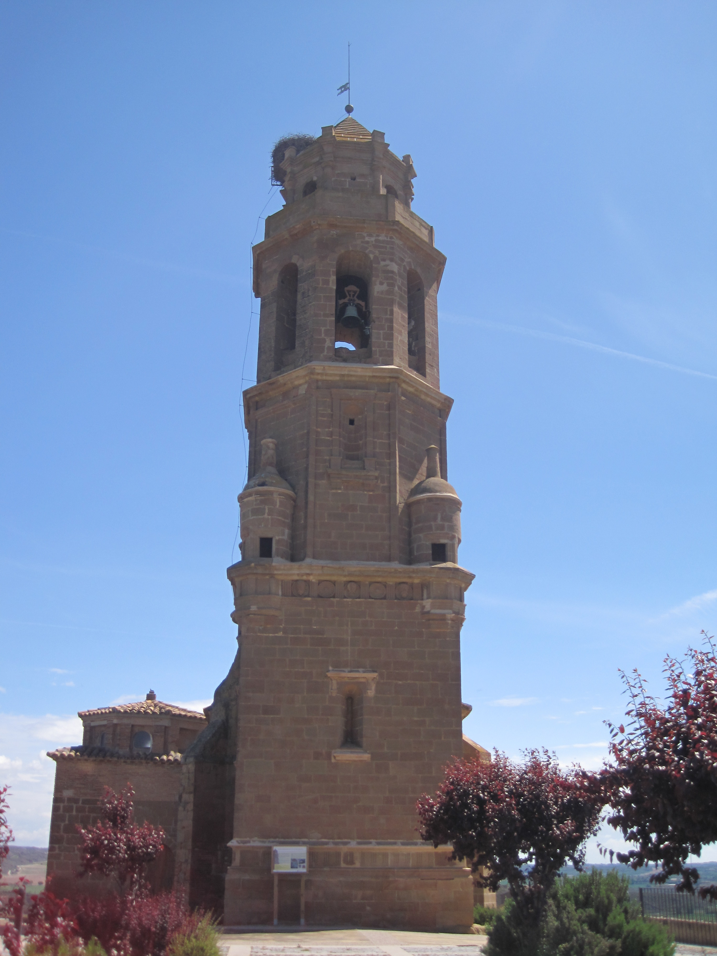 Aragonés: Torre d'a ilesia de l'Asumpción de Castillón d'o Puent, Semontano de Balbastro, Aragón.